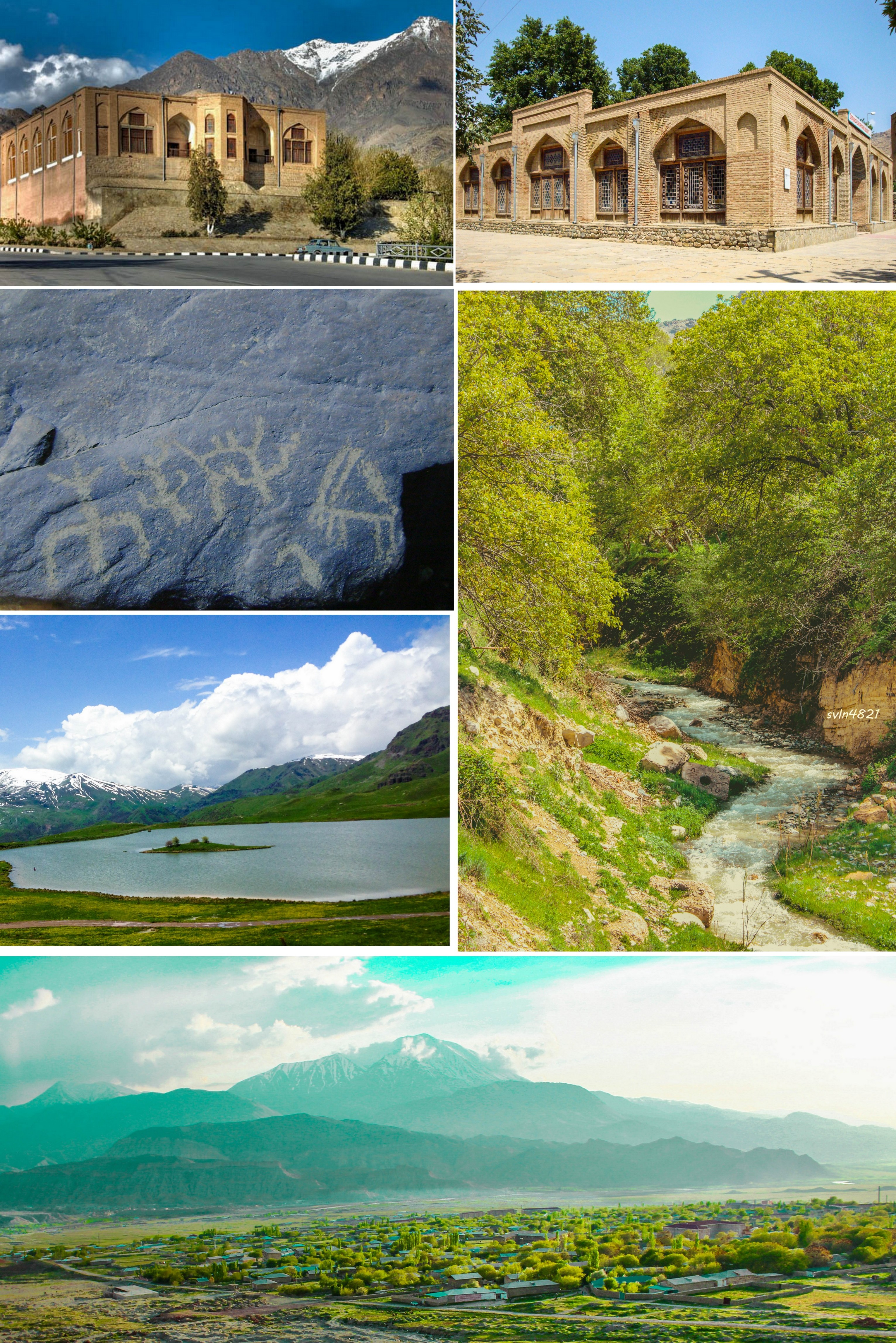 Montage of pictures of Ordubad used for the specific article. Composition of these pictures: File:Dubendi cay ordubad svln4821.jpg File:Batabat gölü 2018-ci ilin iyununda.jpg File:Gemigaya 1.JPG File:Ordubad 2016 menzere sekilleri svln4821 views landscapes.jpg File:Ordubad cümə məscidi ümumi görünüş.jpg File:Ordubadda Qeysəriyyə abidəsi 03.JPG